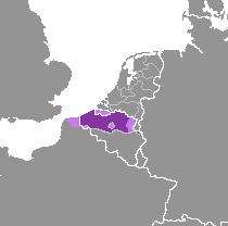 Dialecto flamenco